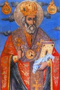 Икона от Тревненската художествена школа. Св. Никола – Йоаникий папа Витан Млади.